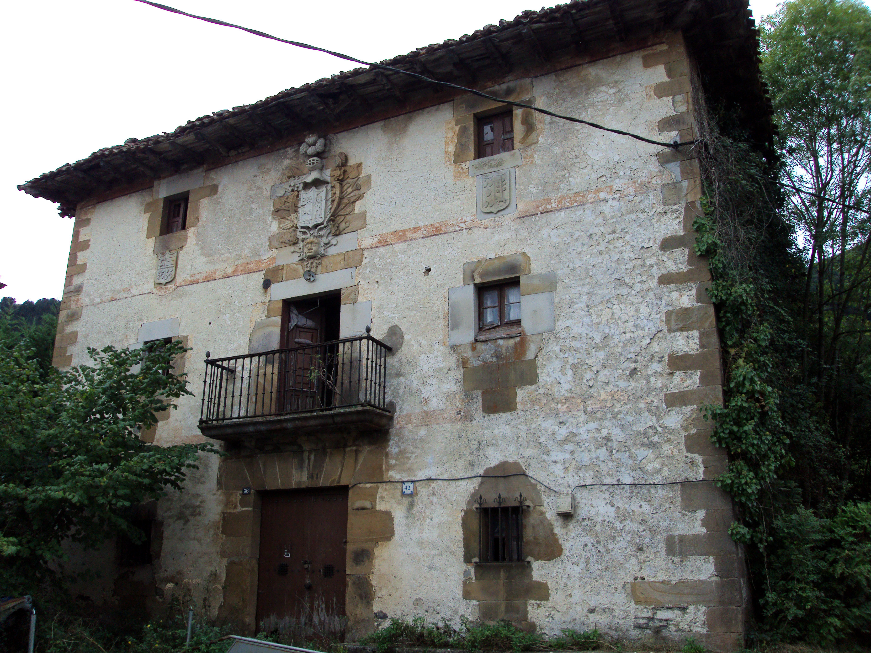 Okendo goikoa jauregia